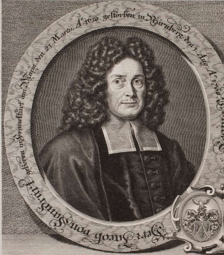 Jacob von Sandrart, Kupferstecher